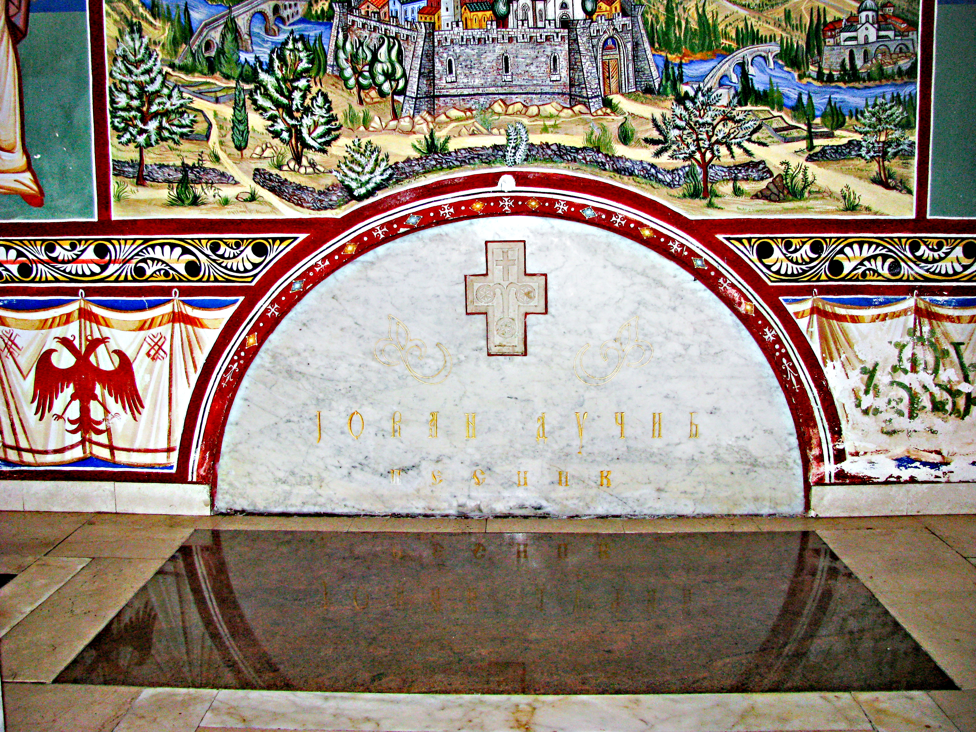 Grob Jovana Dučića u Hercegovačkoj Gračanici